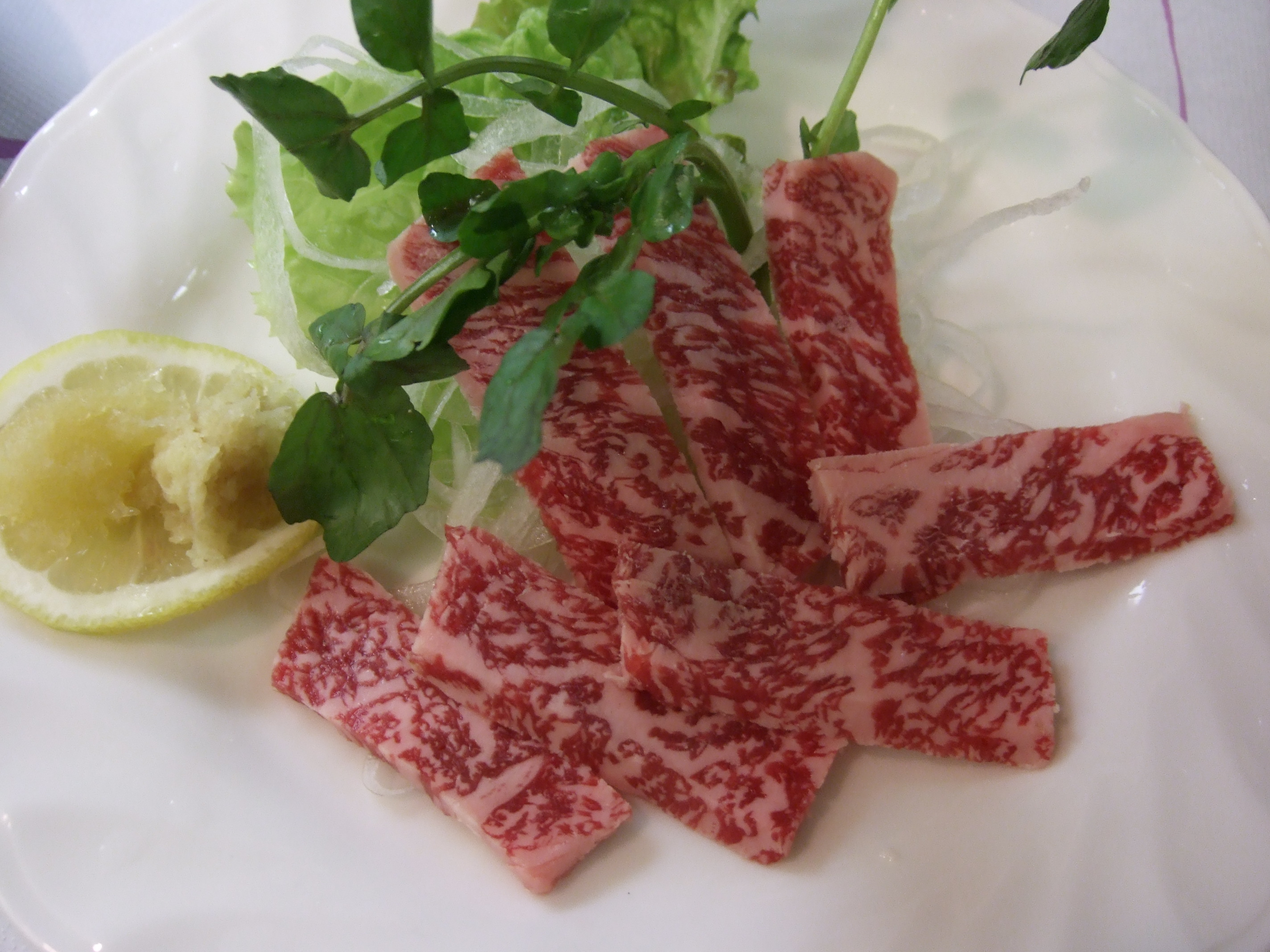 Beef sashimi